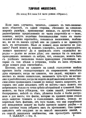 Статья "Уличная философия" ("Отечественные записки, 1869, № 6), посвящённая роману И. А. Гончарова "Обрыв"